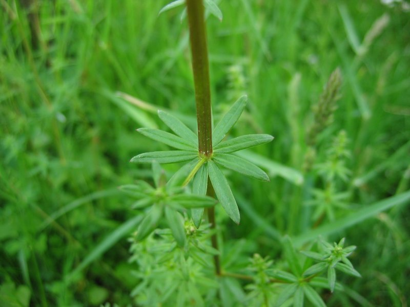 Blatt eines Weißen Labkrautes Galium album